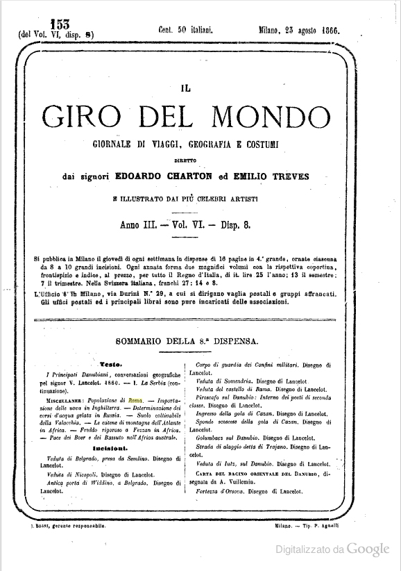 Frontespizio di Il Giro del Mondo, anno III. vol. VI. Disp. 8, Milano 25 agosto 1866 (snapshot da Google)